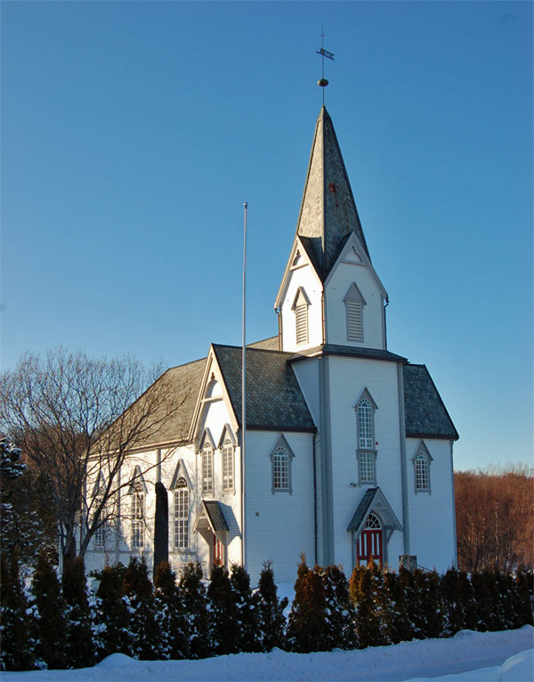 Indre Herøy Kirke in der westnorwegischen Gemeinde Herøy